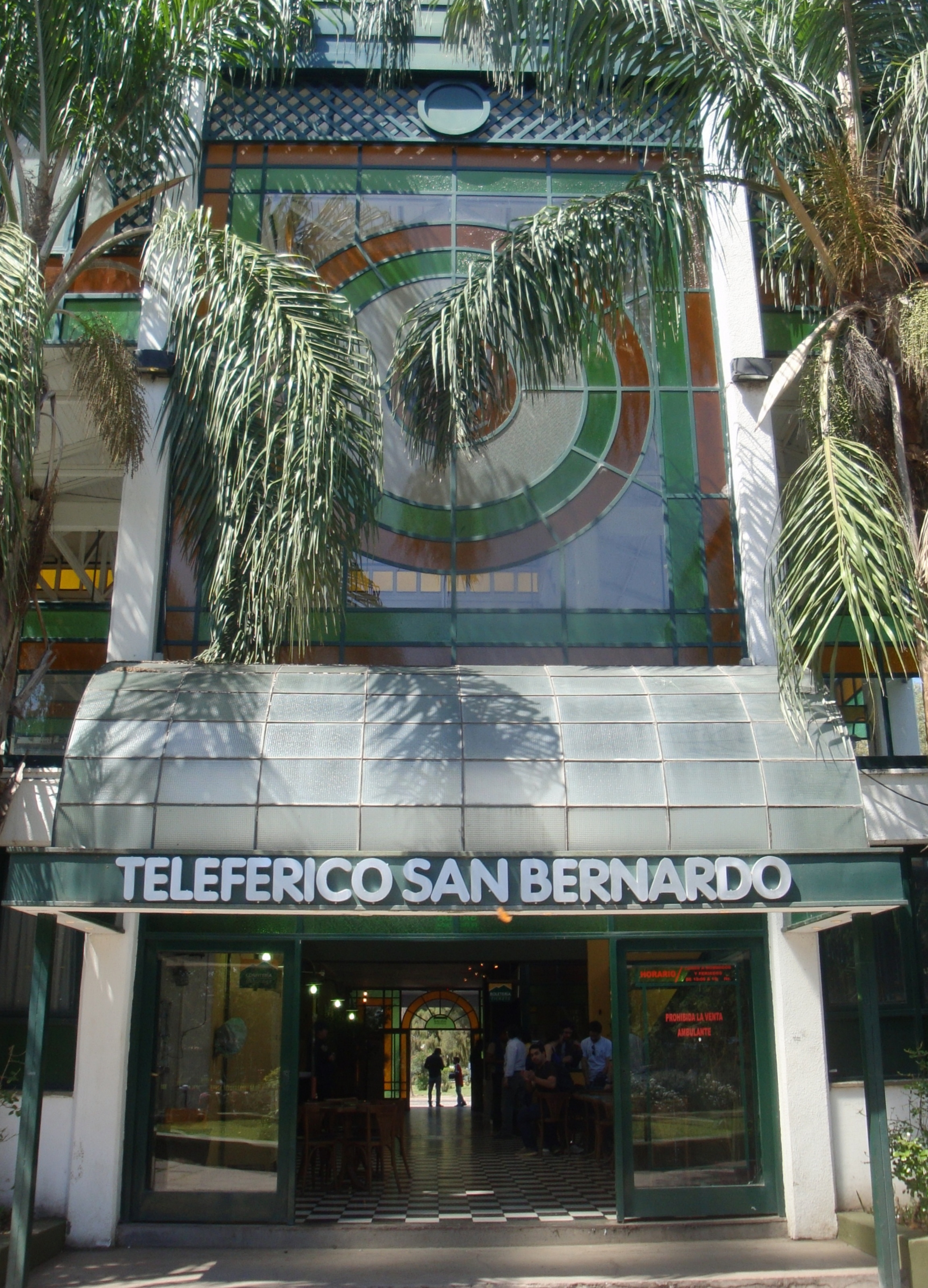 Entrada al edificio donde opera el Teleférico San Bernardo, Salta, Argentina.